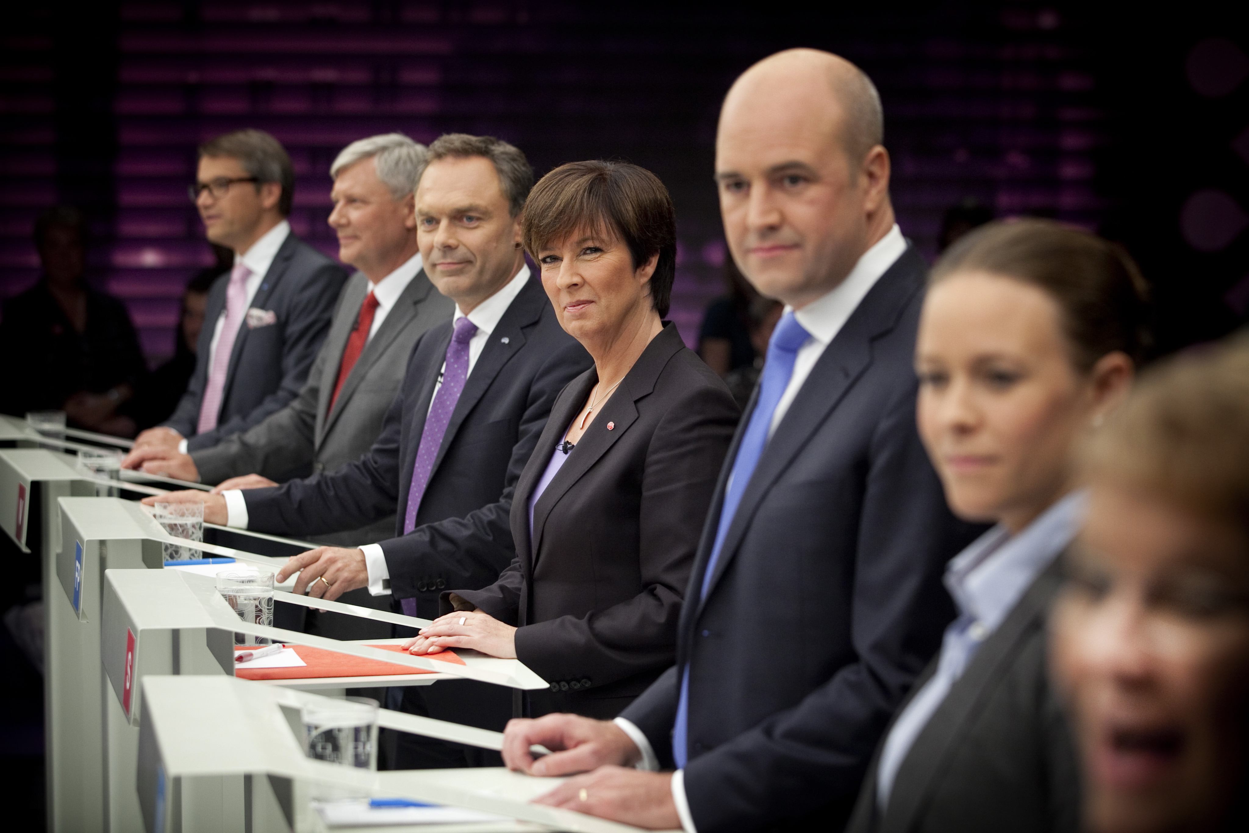 Slutdebatt i SVT.